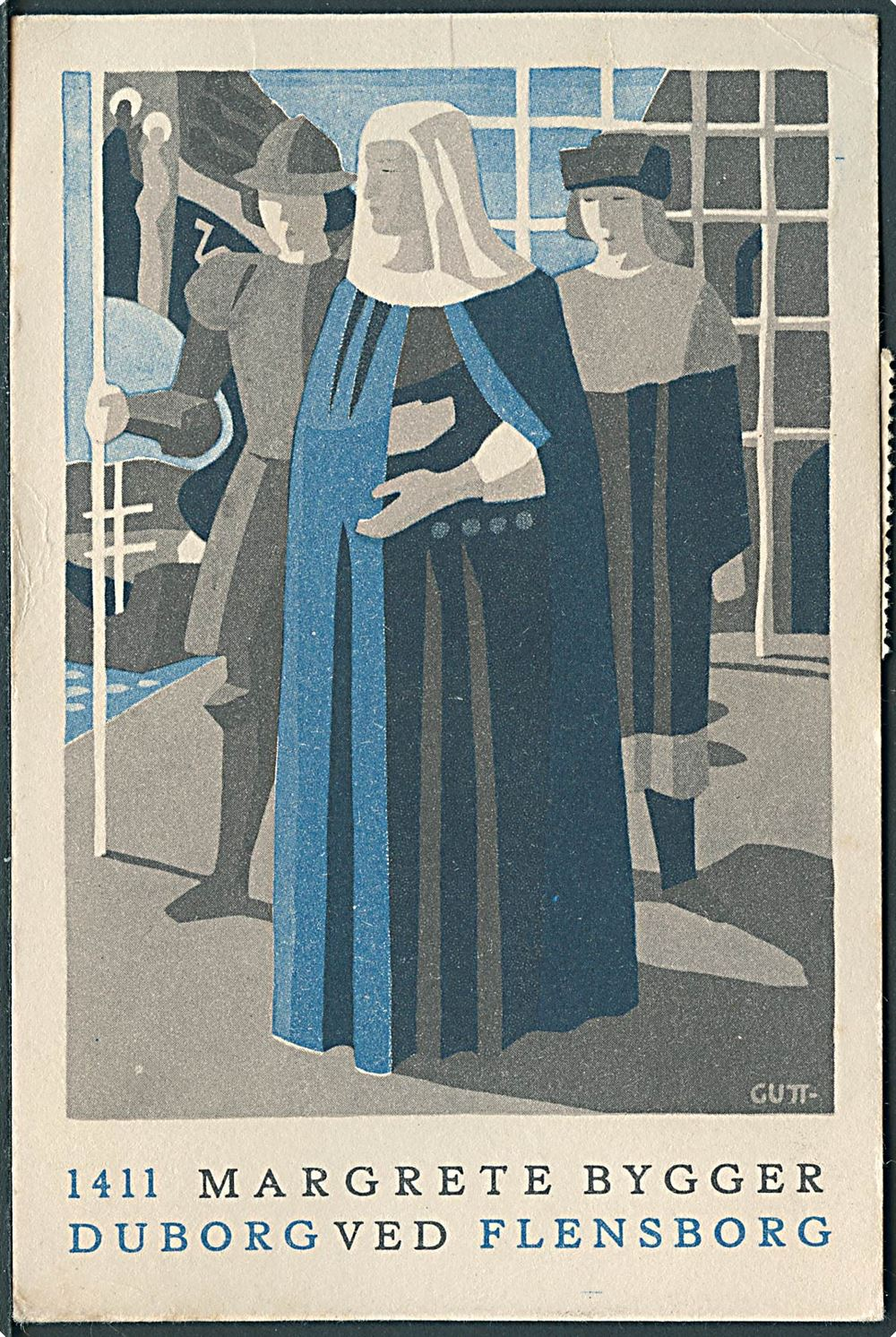 Viggo Guttorm-Pedersen: 1411-Margrete-bygger-Duborg-ved-Flensborg